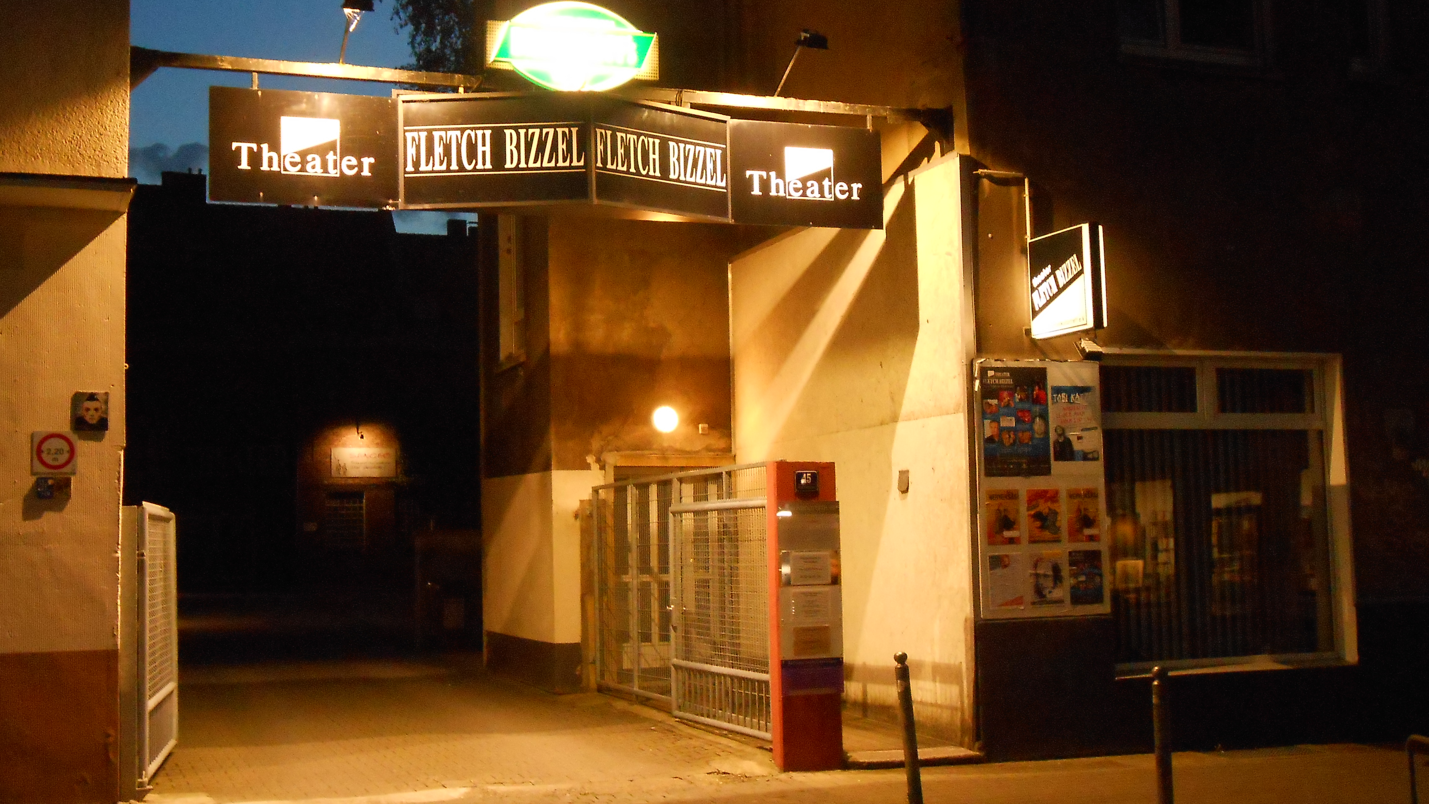 Eingang zum Theater Fletch Bizzel am Abend.